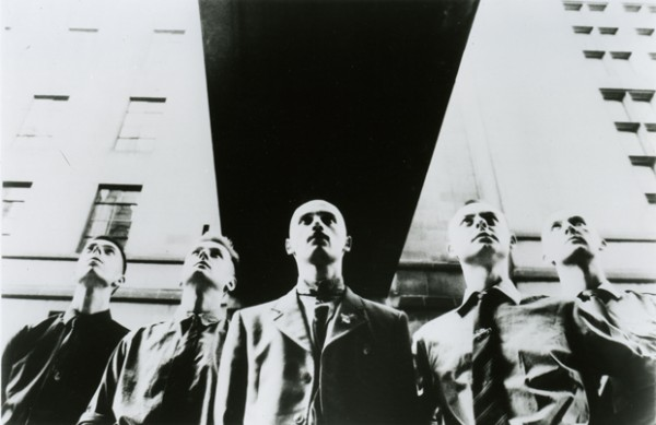 Laibach; Pressefoto 1989